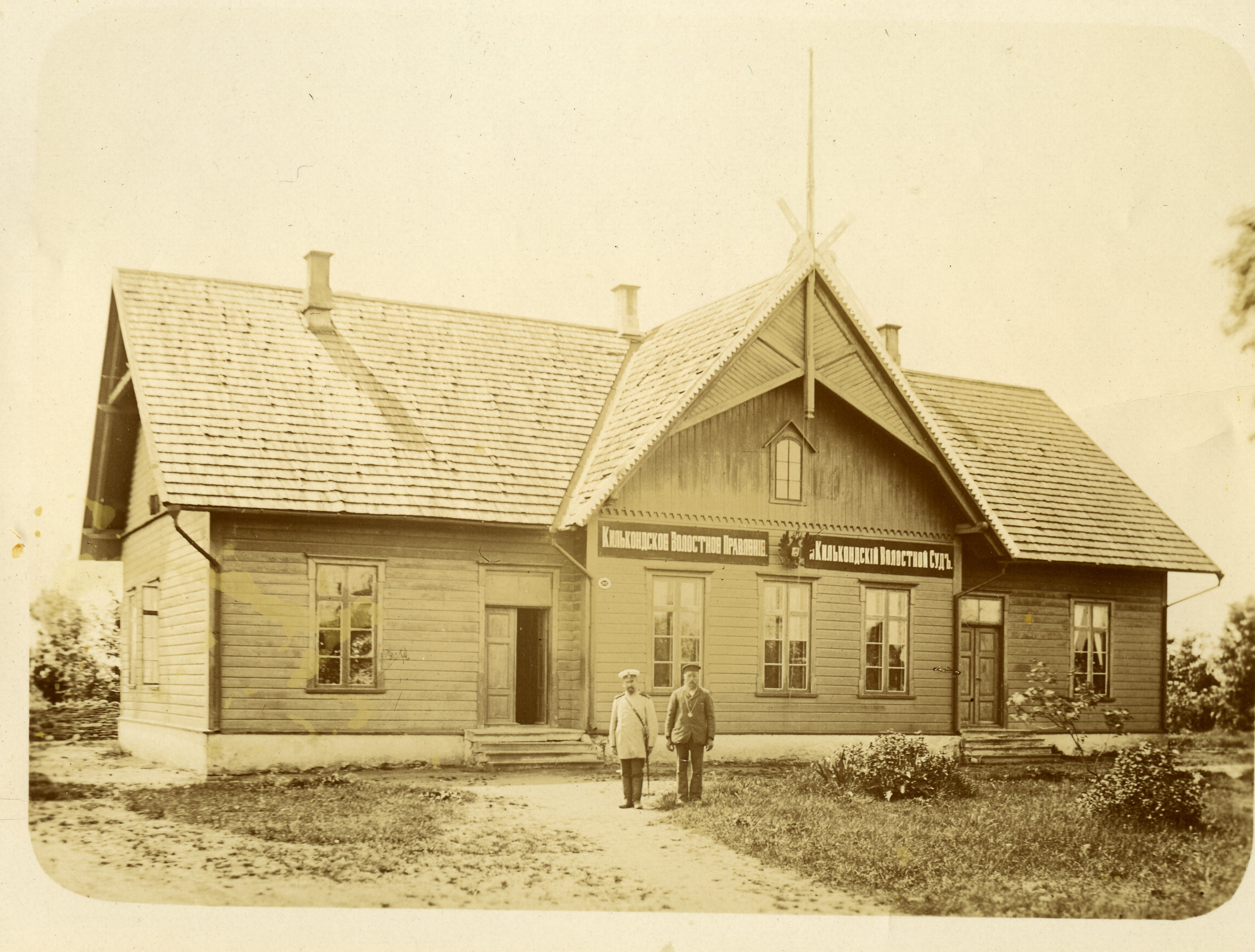 1892-1893 ehitatud Kihelkonna vallamaja